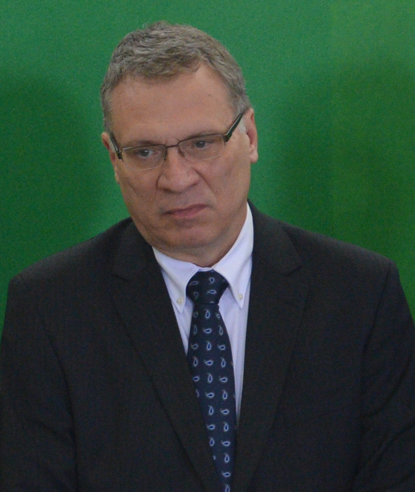 O ministro da Justiça Eugênio Aragão.